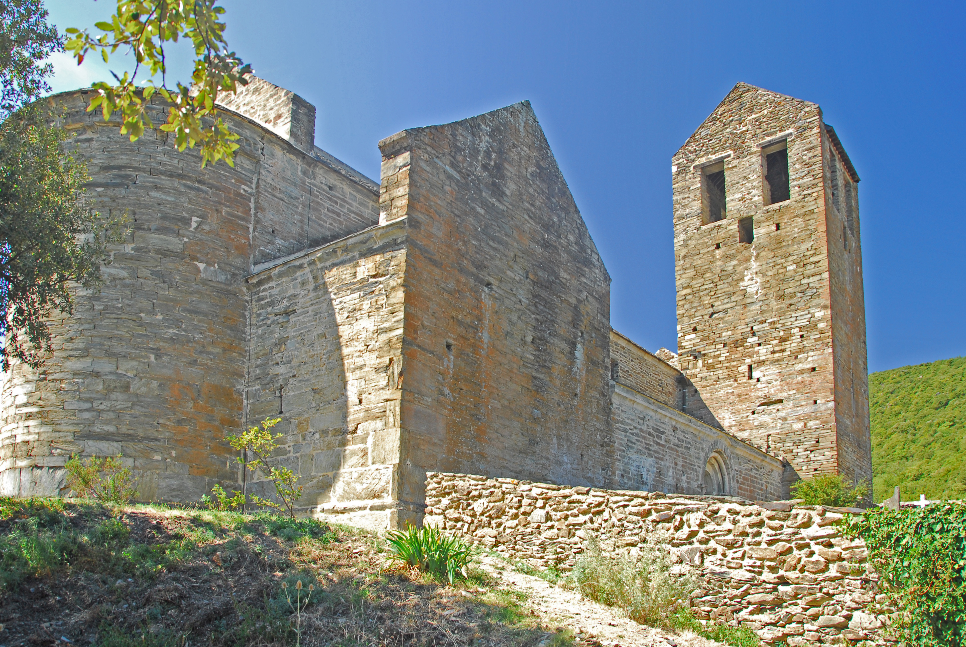 Serrabone, Ansicht von NO